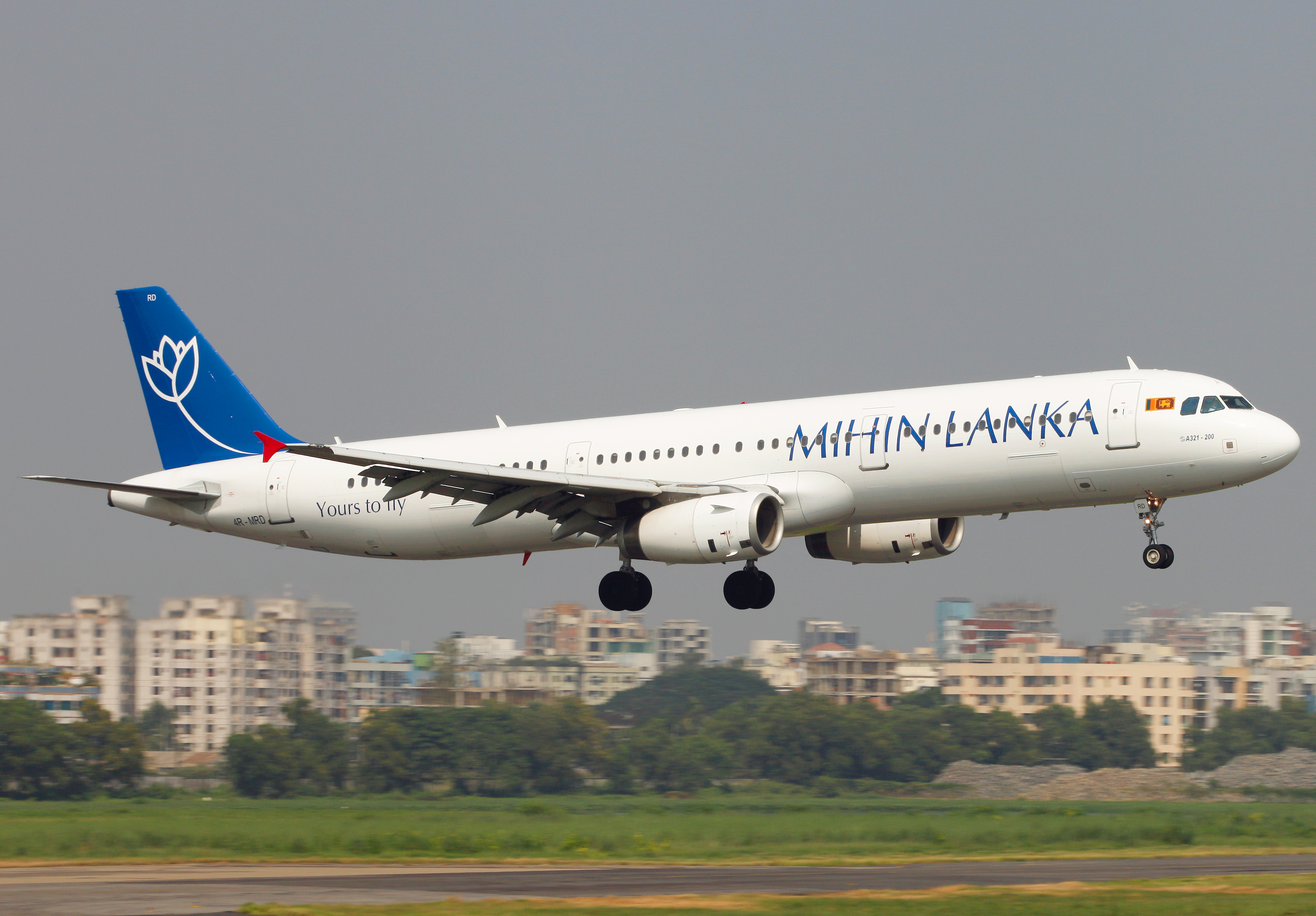 4R-MRD Airbus A321-231 Mihin Lanka Landing at Hazrat Shahjalal International Airport Dhaka ( DAC / VGHS )